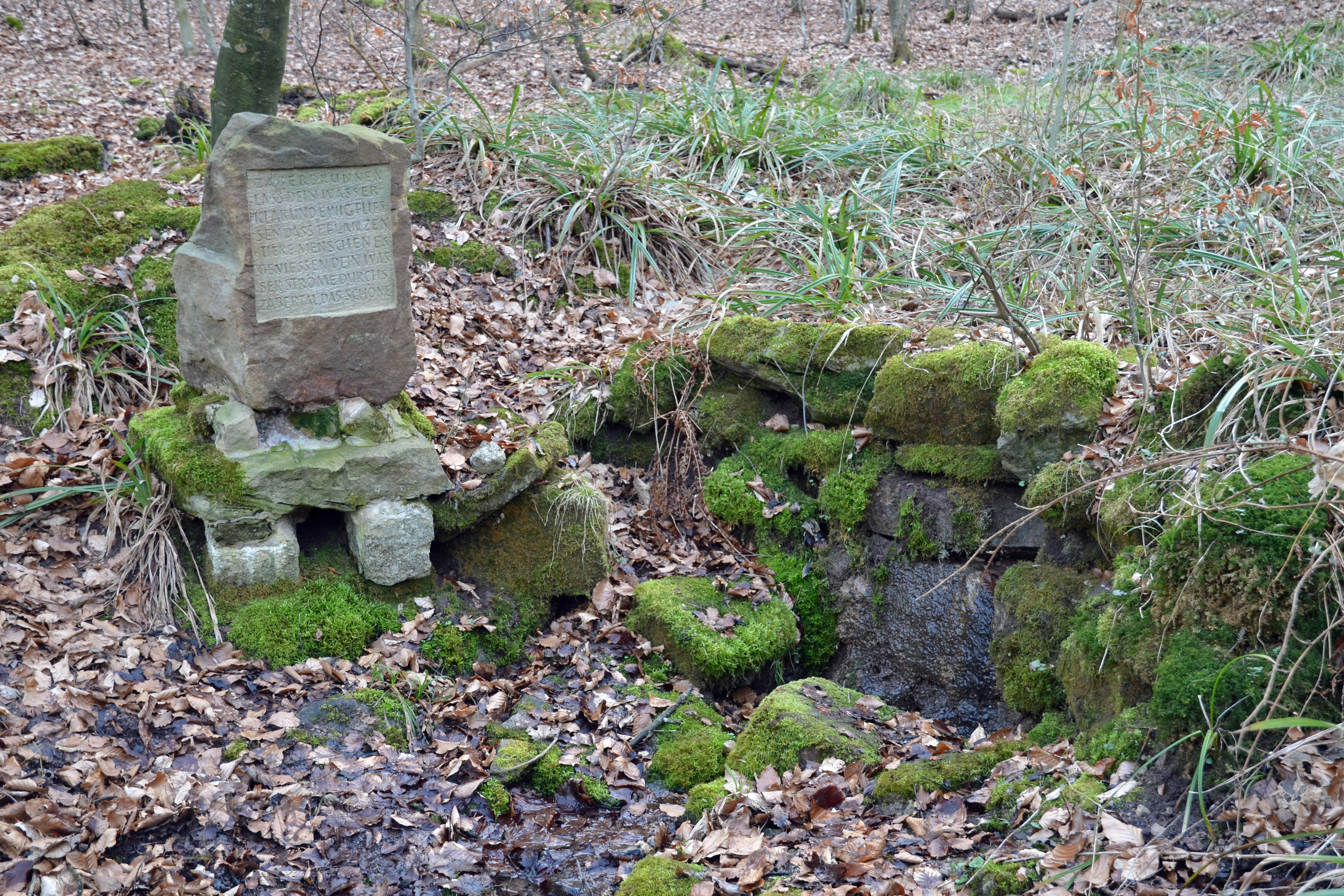 Ursprung der Zaber an der Kreisstraße 2062 zwischen Zaberfeld und Häfnerhaslach. Die Inschrift lautet: ZABERBRUNNEN LASS DEIN WASSER KLAR UND EWIG FLIES- SEN, DASS PFLANZEN, TIERE, MENSCHEN ES GENIESSEN. DEIN WAS- SER STRÖME DURCHS ZABERTAL, DAS SCHÖNE.